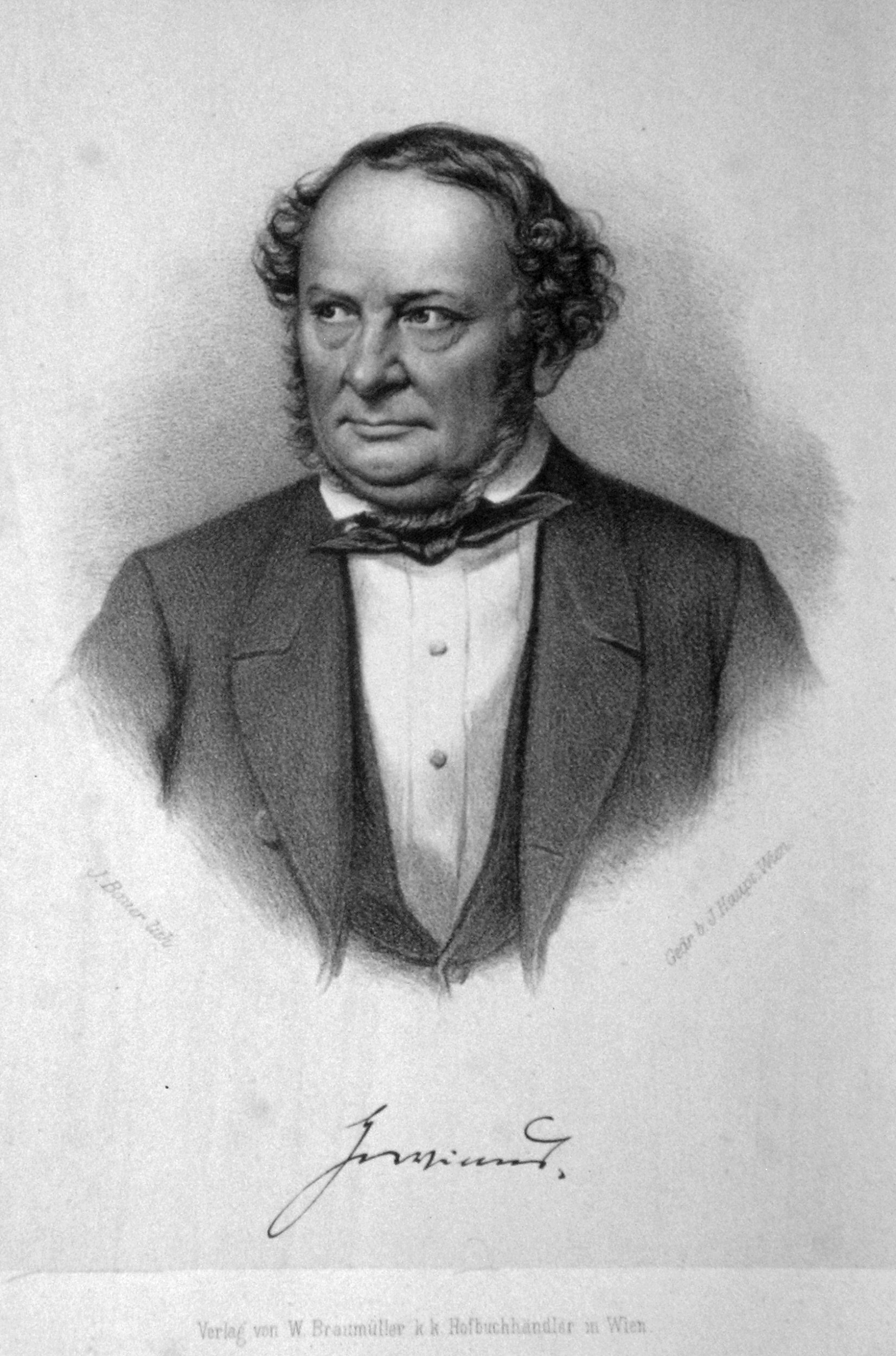 Georg Gottfried Gervinus, Lithographie von Josef Bauer